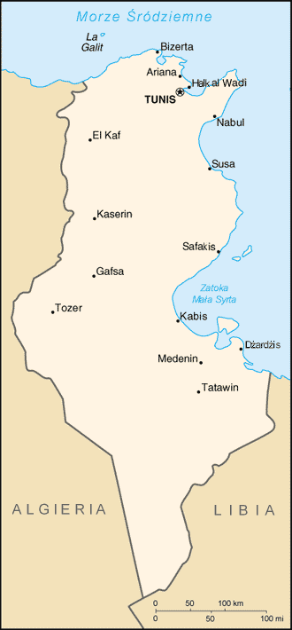 Mapa Tunezji, wersja polska, CIA World Factbook